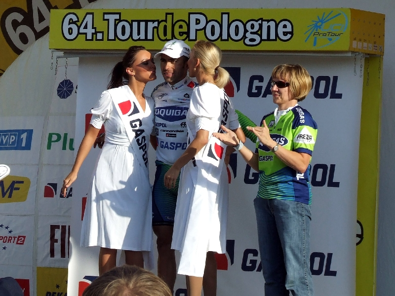 Piąty etap 64. Tour de Pologne: Września - Świdnica Licensing: This image or multimedia was created by Bartosz Senderek. The image or audio is licensed under CC-BY license. Attribution to me is required. Licencja: Ten obrazek lub plik multimedialny został stworzony przez Barotsza Senderka. Został on udostępniony na licencji CC-BY. Informacja o moim autorstwie jest wymagana. "I want to use the image/multimedia. How can I do that?" You can use this image/multimedia freely for any purpose, including commercial use, provided that you license it under the above license. My suggestion is to use text shown below: If you use the image I would appreciate it if you would let me know on my talk page, but this is not required as long as you follow the above license. "Chcę użyć tego pliku. Jak mogę to zrobić?" Możesz używać tej grafiki/multimediów darmowo w każdym celu, włączając użycie komercyjne, udostępniając go dalej na powyższej licencji. Jeśli zdecydujesz się na publikację zdjęcia mojego autorstwa obowiązkowo podpisz go w sposób podany w sekcji "Licensing text". Jeżeli użyłeś mojego pliku możesz powiadomić mnie o tym na mojej stronie dyskusji, lecz nie jest to wymagane, dopóki trzymasz się powyższej licencji.